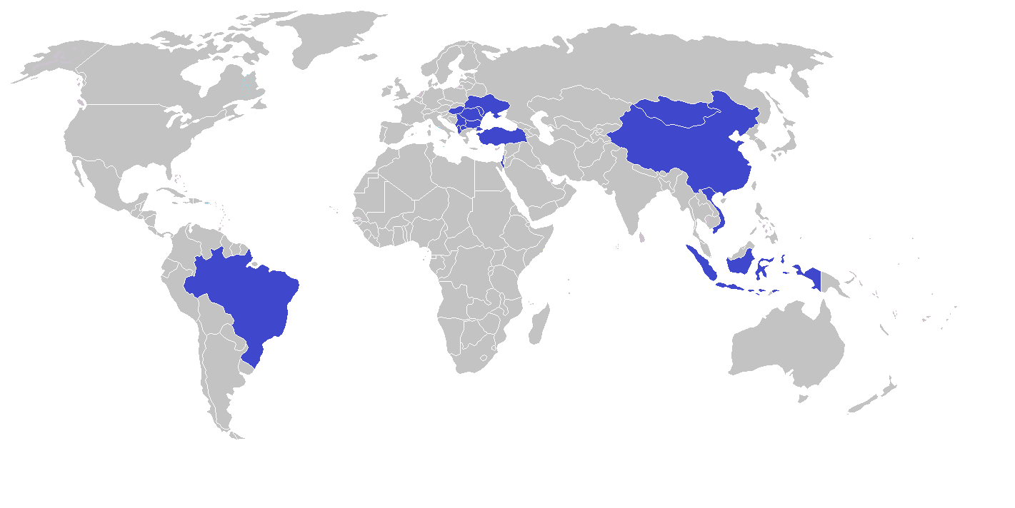 Участници на Олимпиадата по румънски език